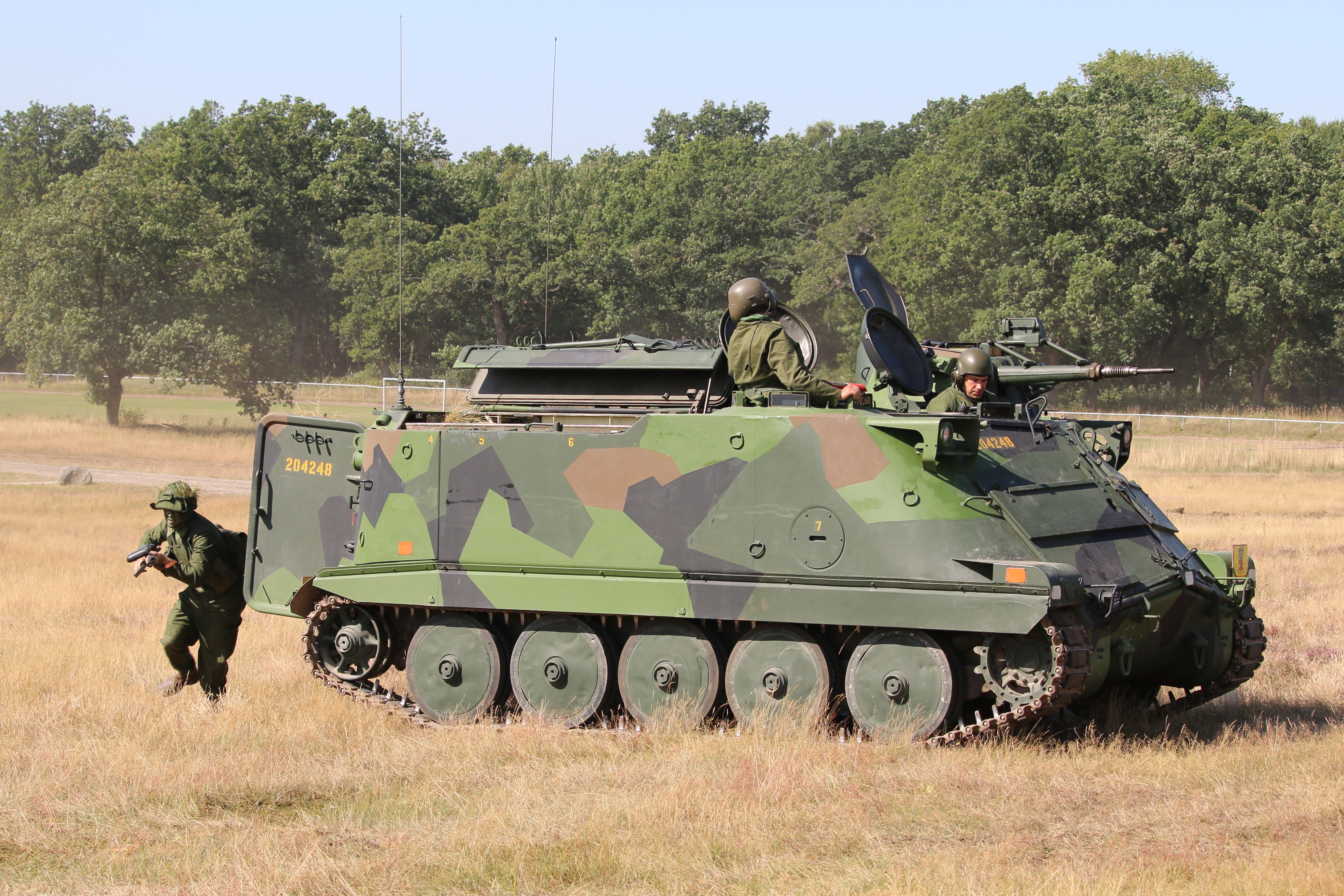 Pansarbandvagn 302 Revinge 2015